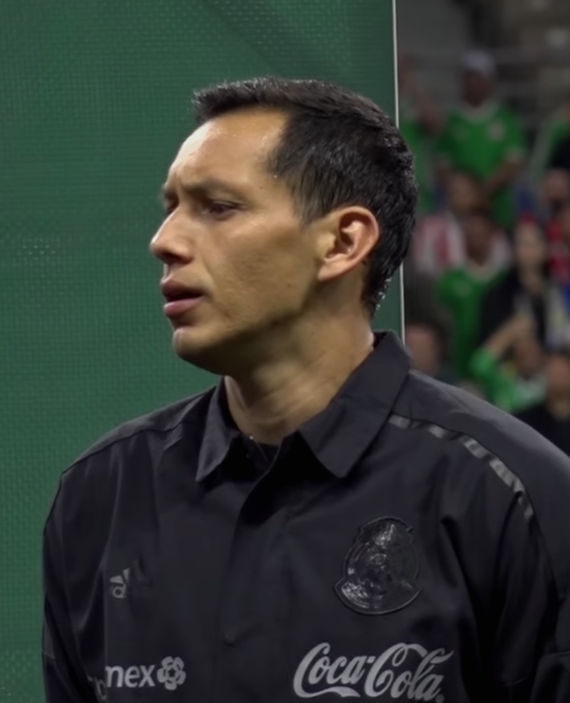 México contra Bosnia en 2018